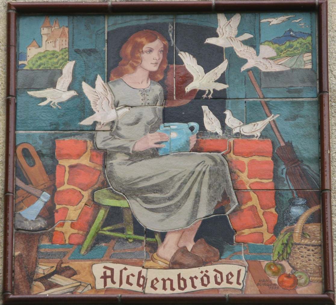 Aschenbrödel (1939) von Hans Burger, Johann-Mithlinger-Siedlung, Raxstraße 7-27, Wien-Favoriten